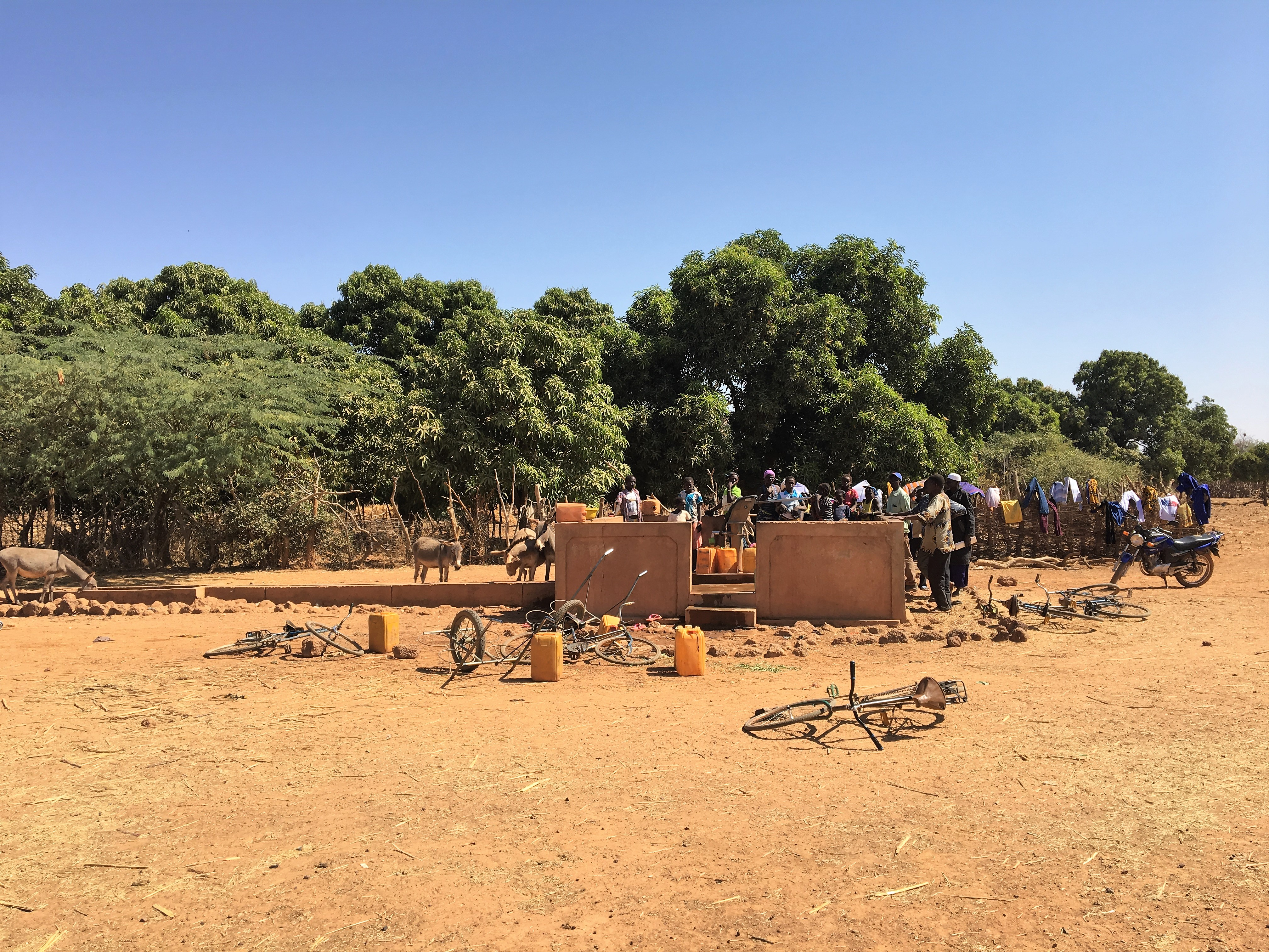 Forage de Darbiti 1, quartier Tilimbougri